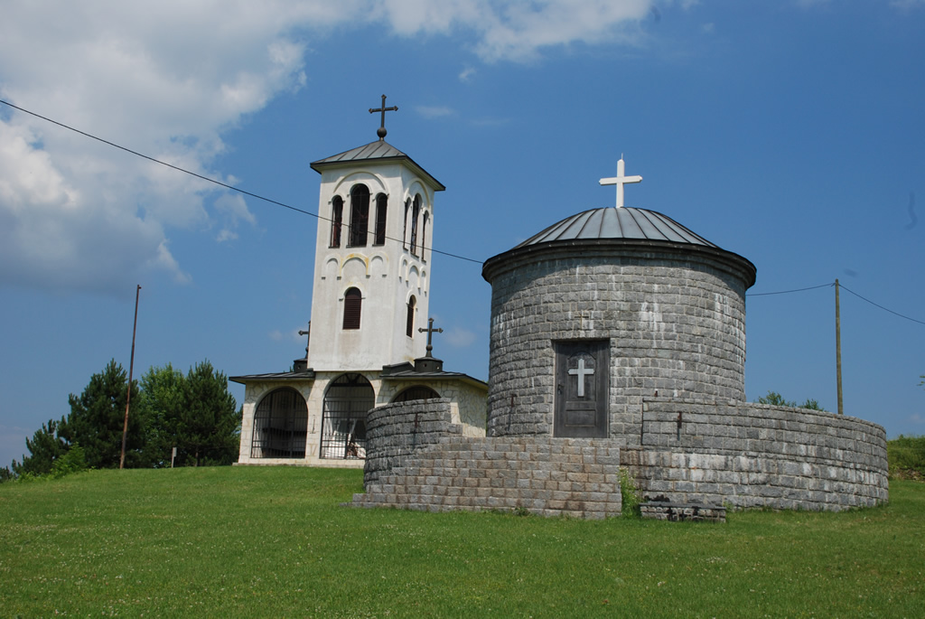 Црква Свете Петке на зворничкој тврђави Ђурђев-град. По предању ту се некад налазио храм посвећен истој светитељки да би био срушен доласком Турака на ове просторе. Храм је изграђен и освештан 2000. године. Аутор: Радиша Кандић.